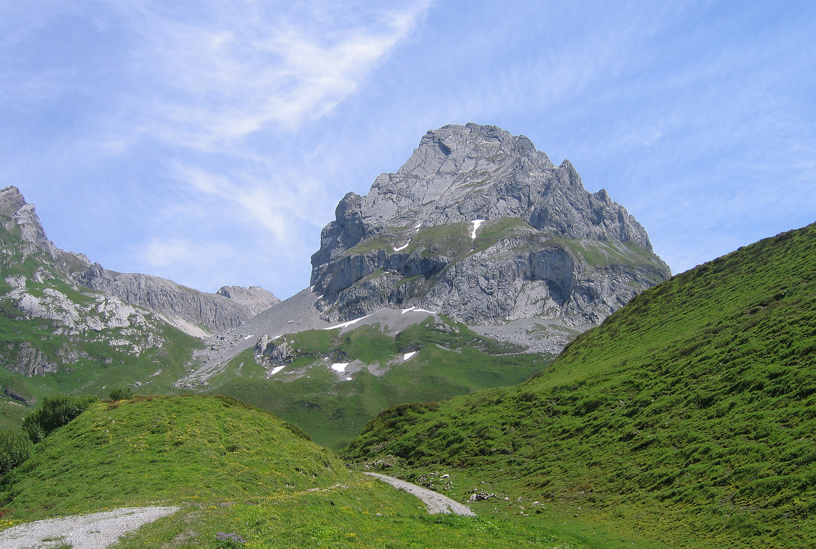 Roggalspitze